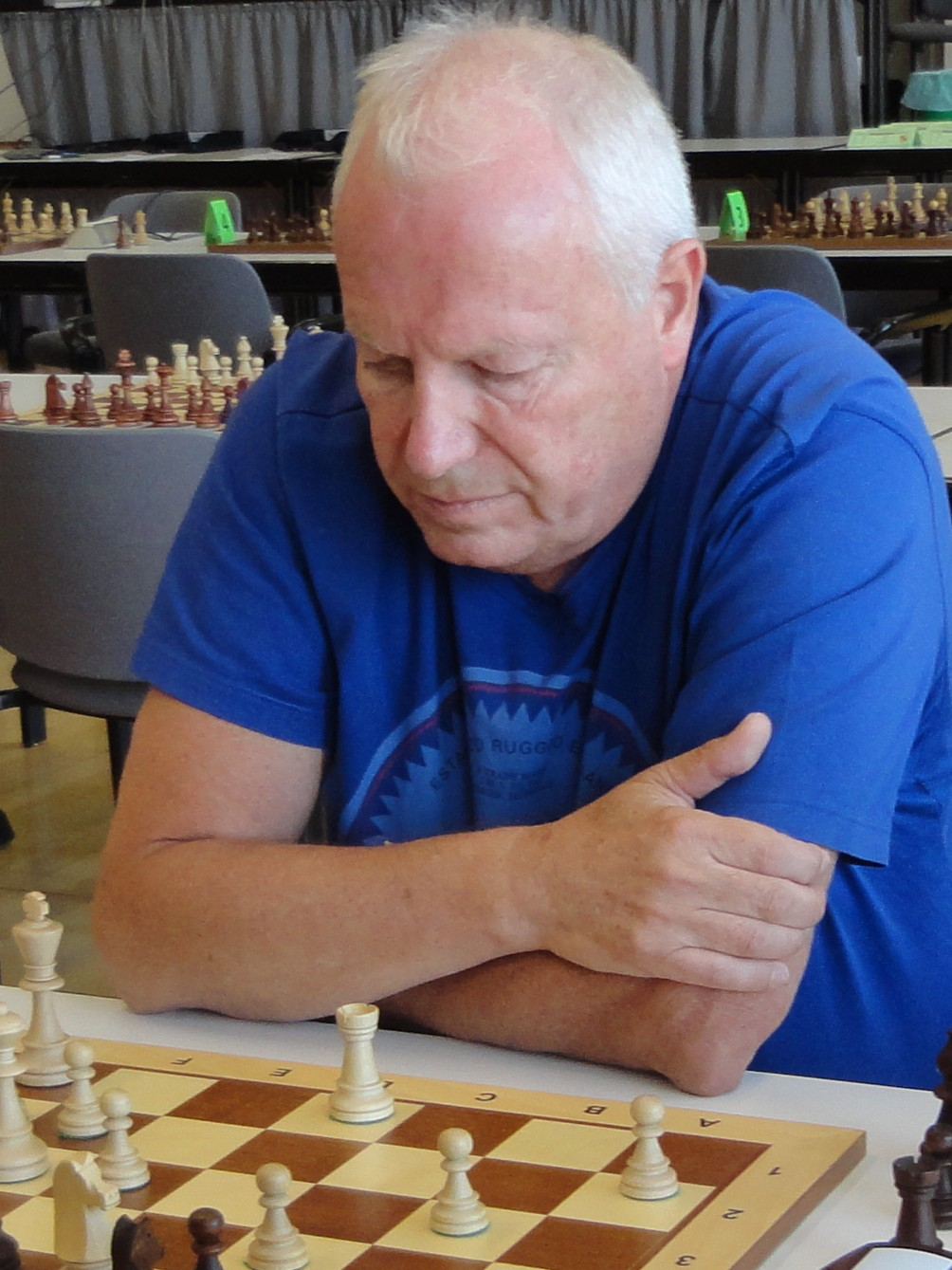 Hans-Joachim Vatter, 2016 in Freudenstadt bei der Baden-Württembergischen Senioren-Blitzmeisterschaft.